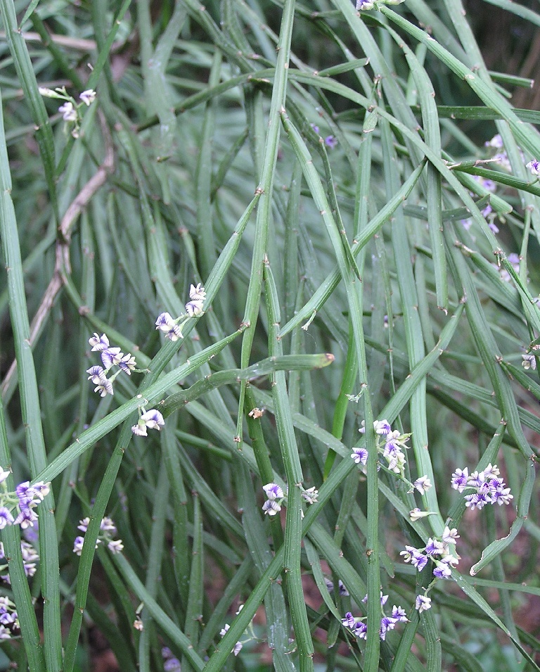 Carmichaelia flagelliformis in der Flora in Köln.